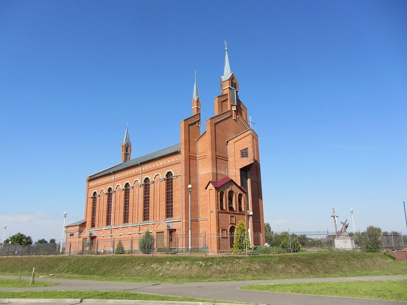 Парк. Ражанка Масты. Касцёл